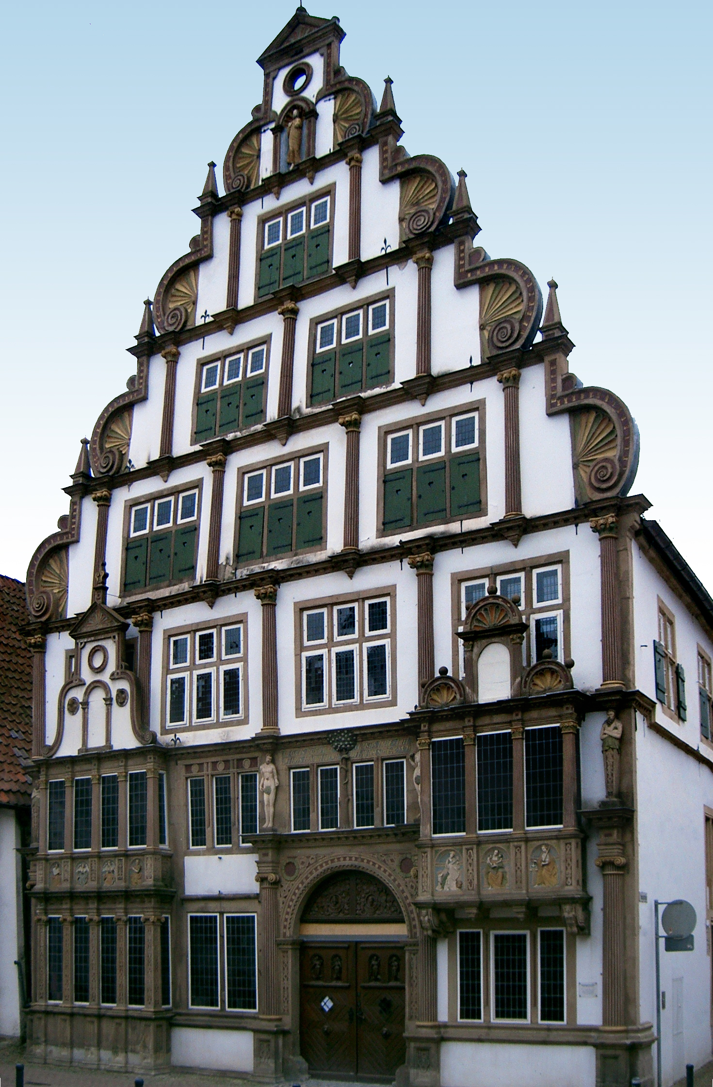 Hexenbürgermeisterhaus in Lemgo/Lippe. Fassade ab 1571. Zustand im Mai 2004.